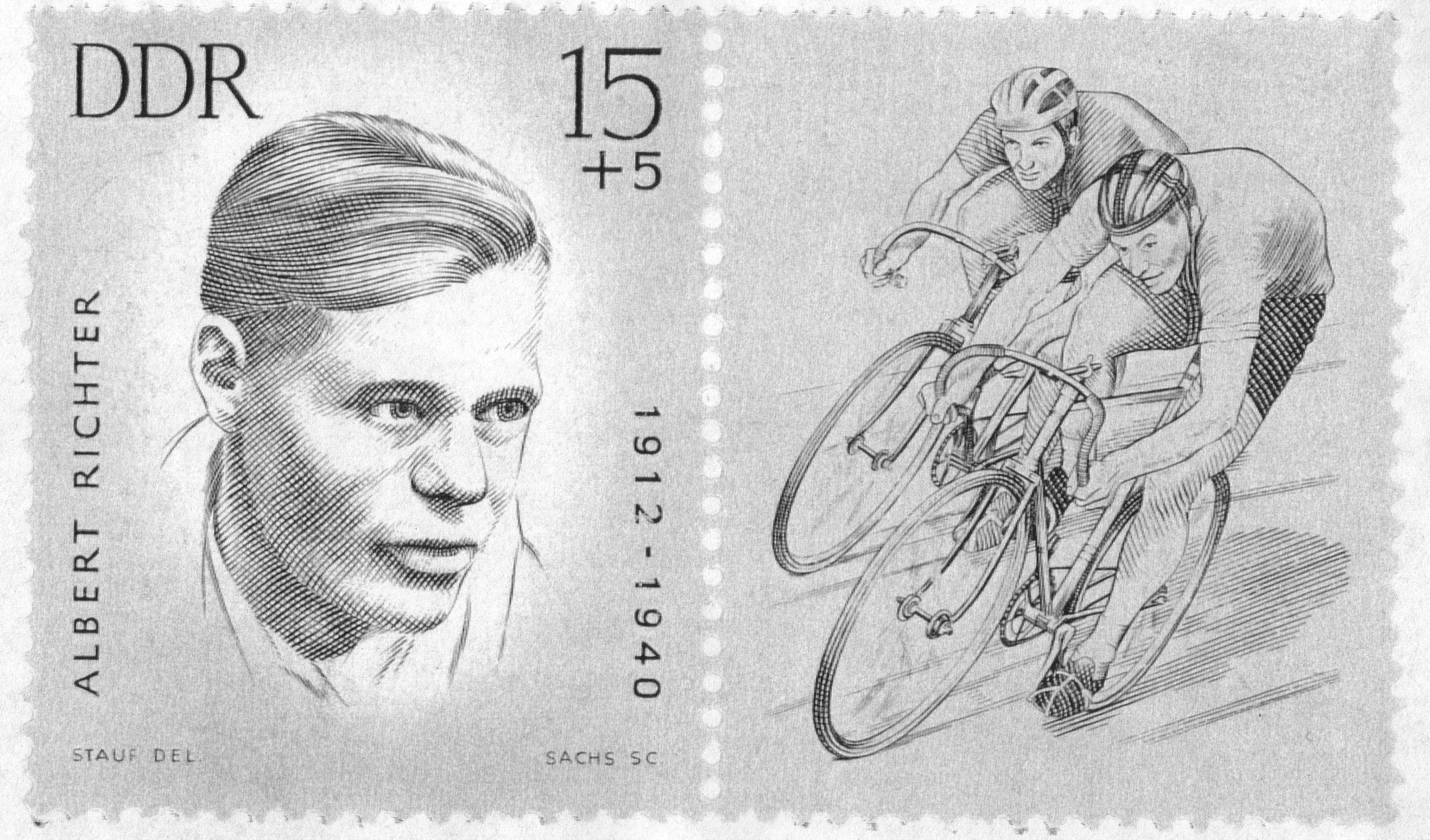 DDR-Briefmarken von 1965, Motiv: Albert Richter (Radrennfahrer)